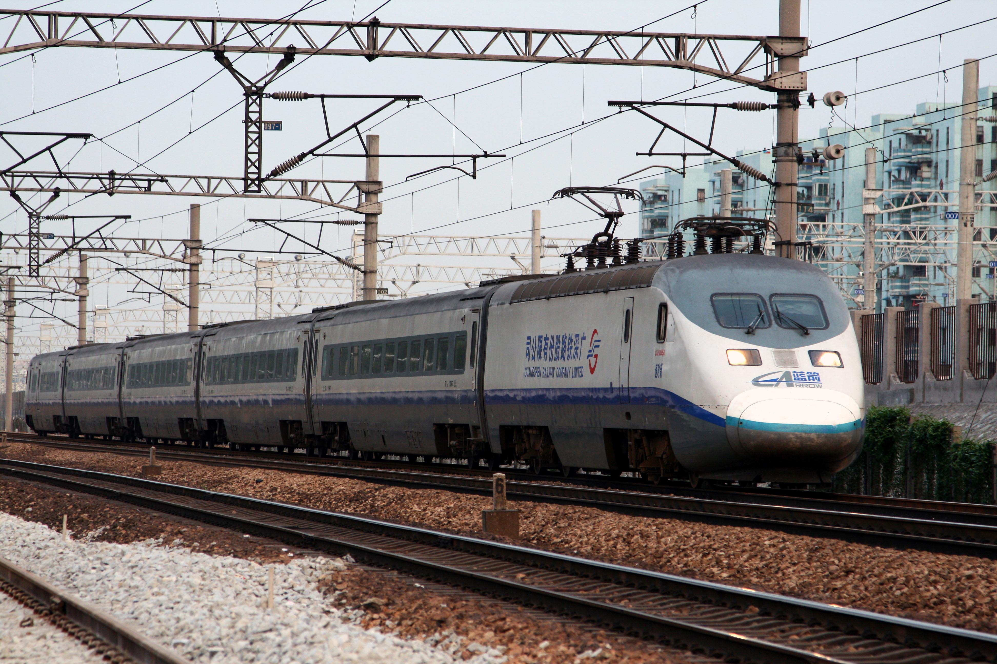 中国铁路DJJ1型“蓝箭”电力动车组行驶于广深线